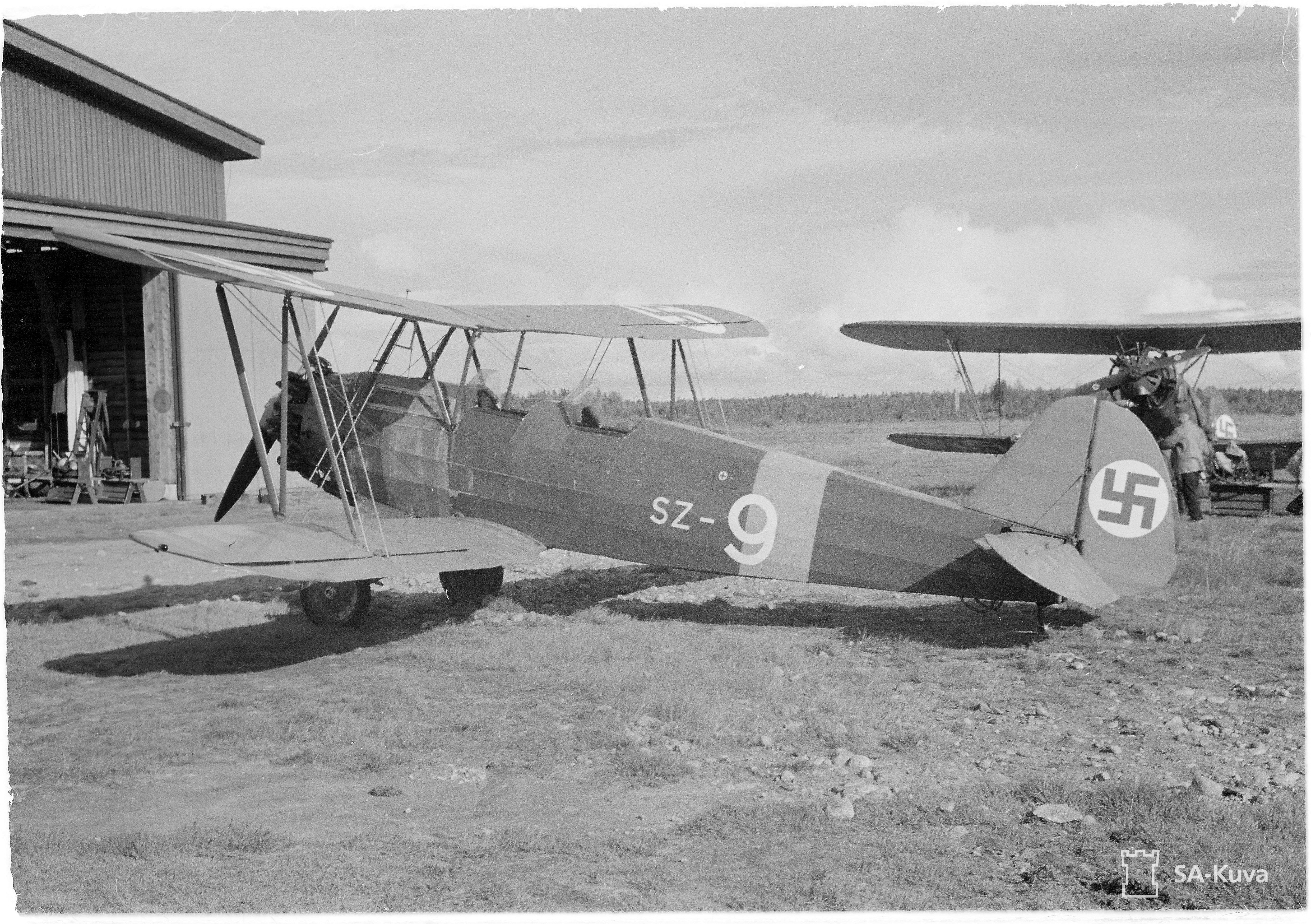 Harjoituskone Stieglitz, tyyppikuvat. (Kuvassa on Focke-Wulf Fw 44 Stieglitz -koulukone) Kuvauspaikka: Kokkola-Kauhava